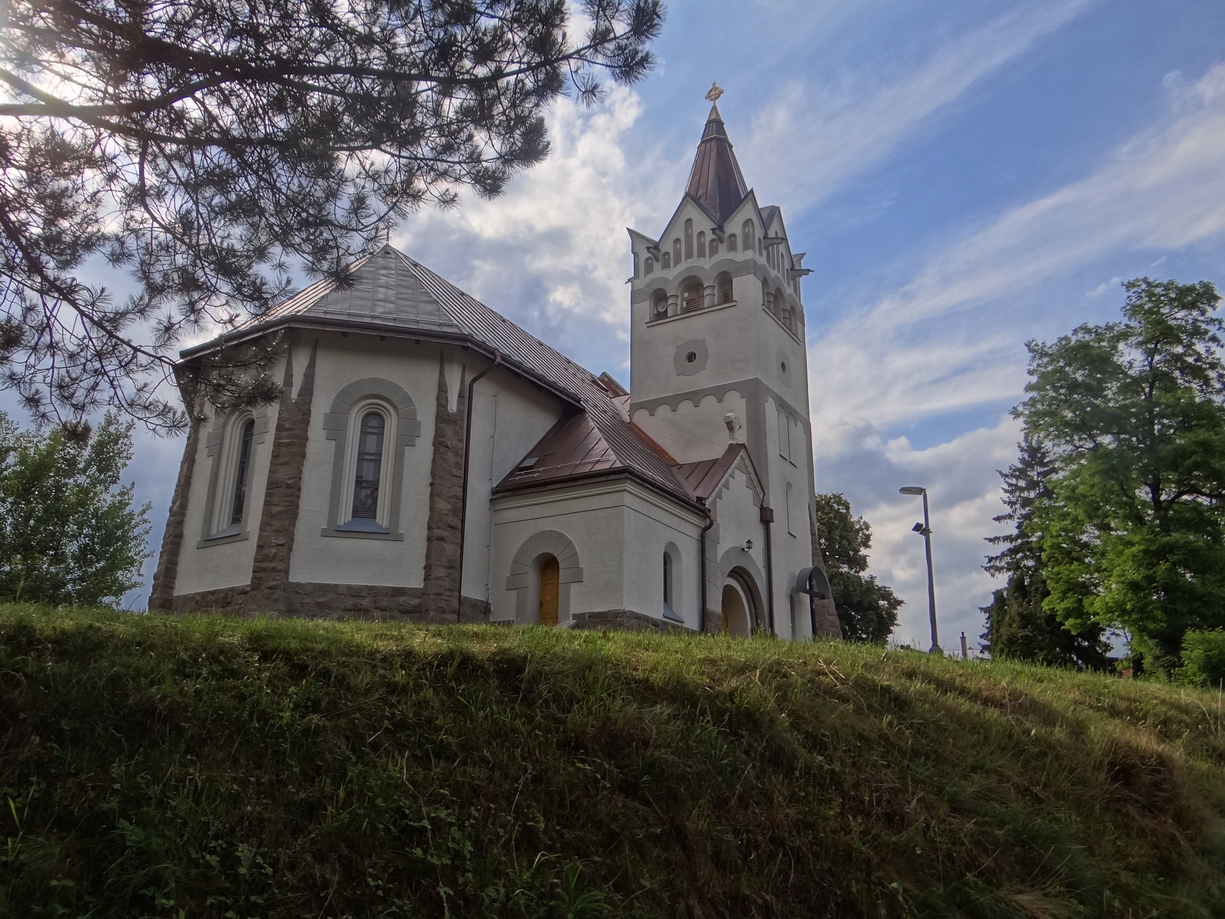 Lacková